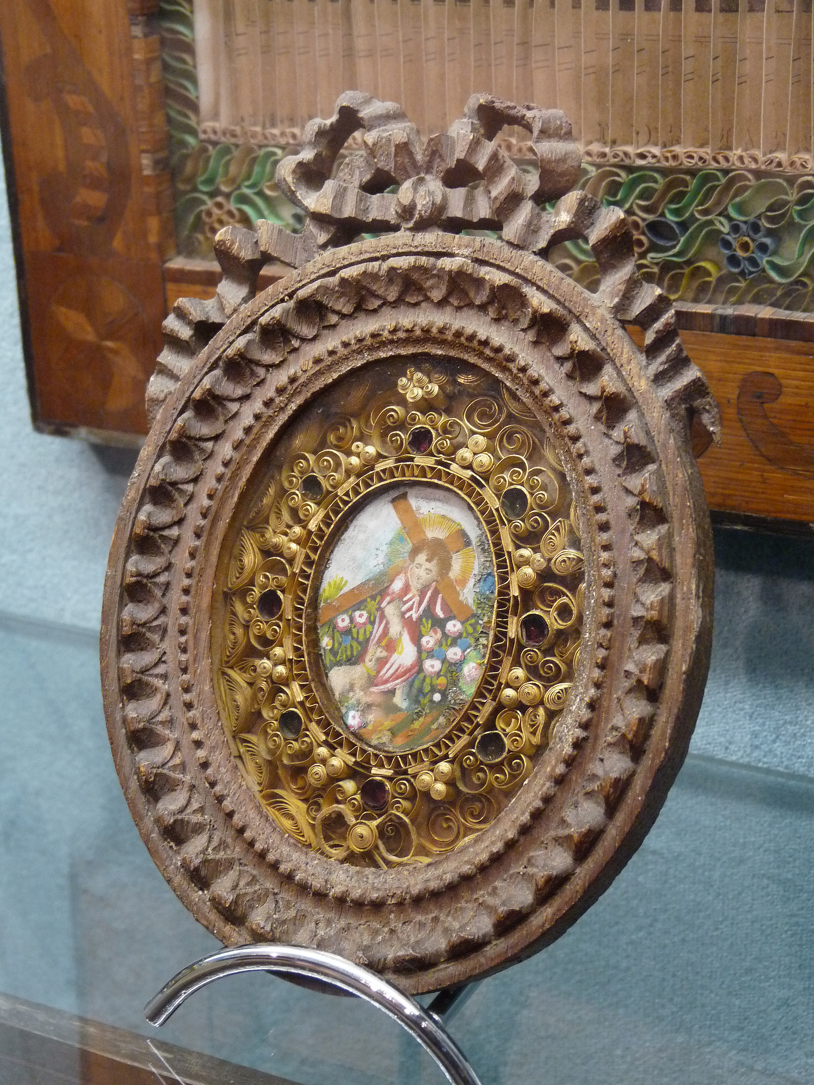 Paperolles (reliquaire) : Christ portant sa croix. Musée Charles de Bruyères, Remiremont